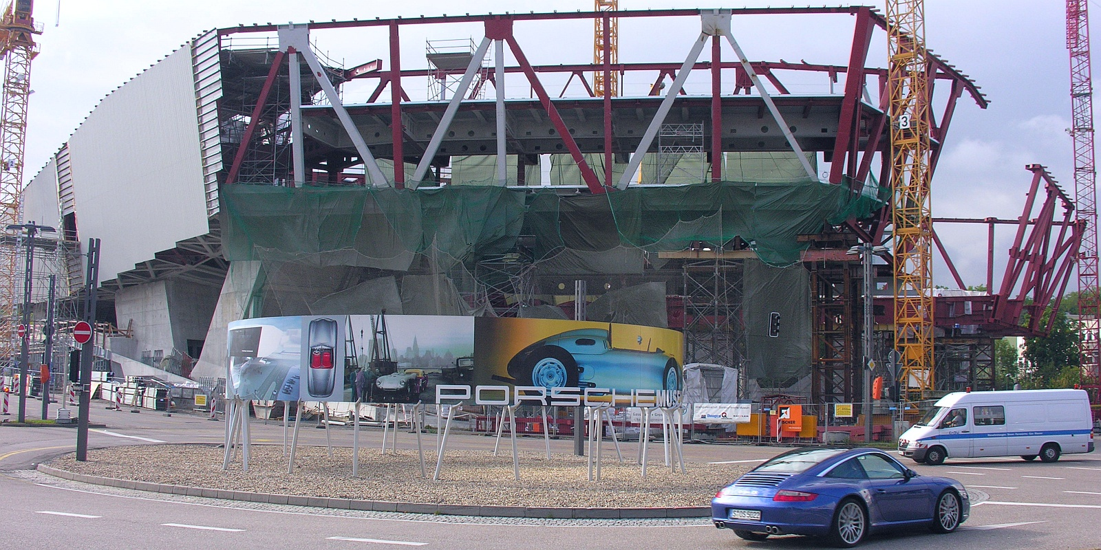 Neues Porsche-Museum am Porscheplatz Stuttgart-Zuffenhausen 2007 Foto Wolfgang Pehlemann